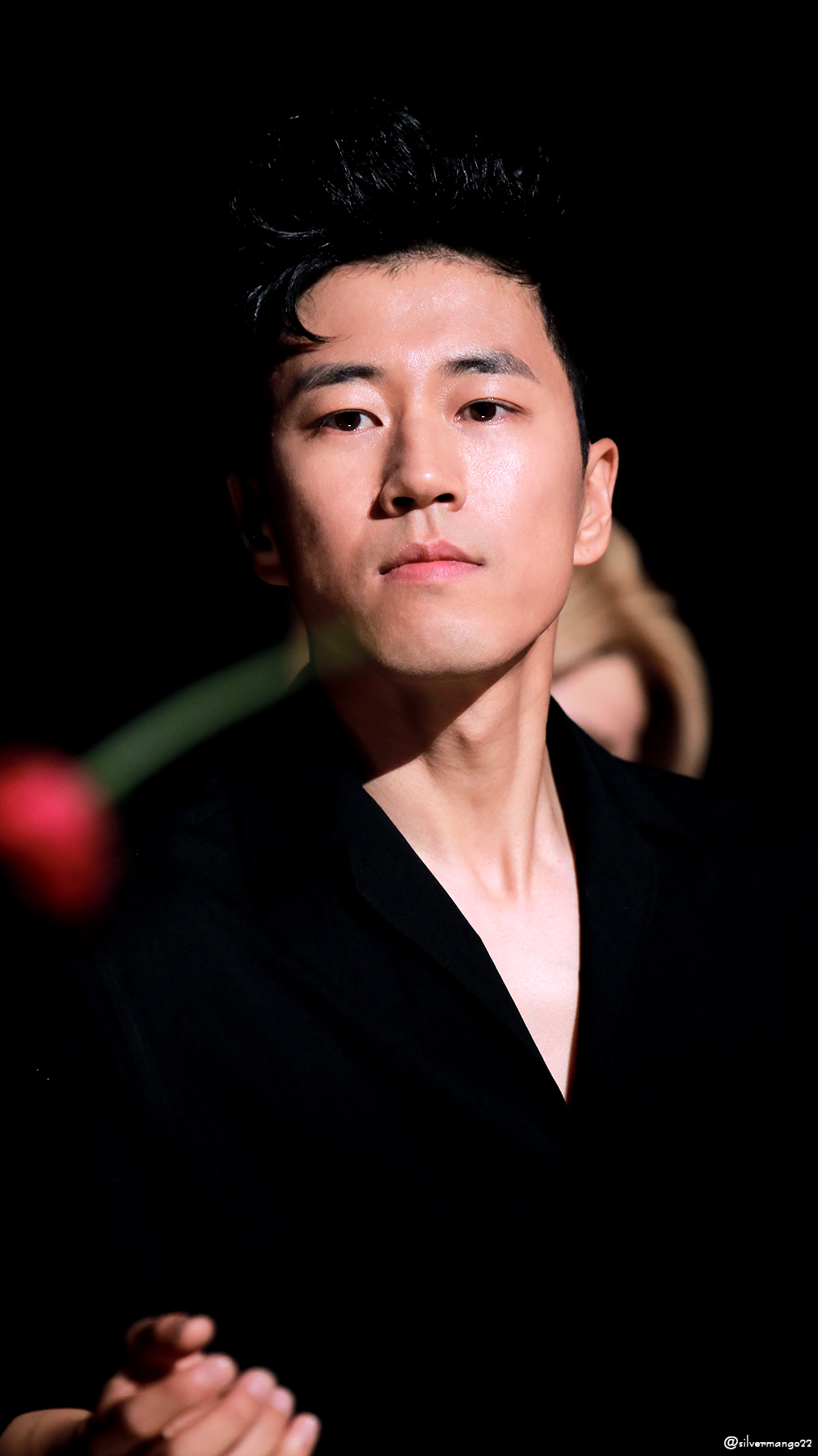 한국어 (조선): 160608 유희열의 스케치북 장수원